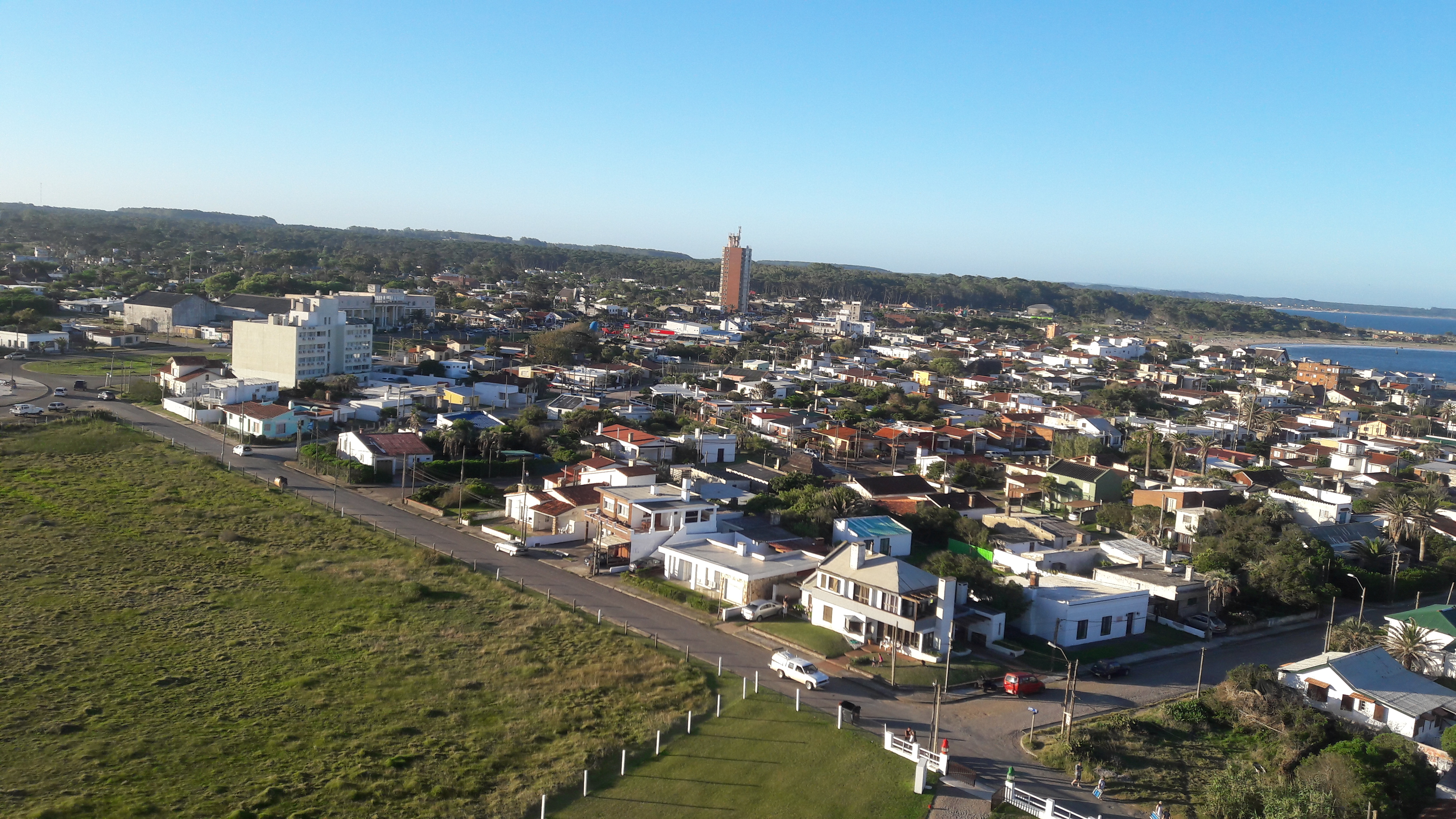 Vista de La Paloma, desde el Faro de Cabo de Santa María, Rocha, Uruguay